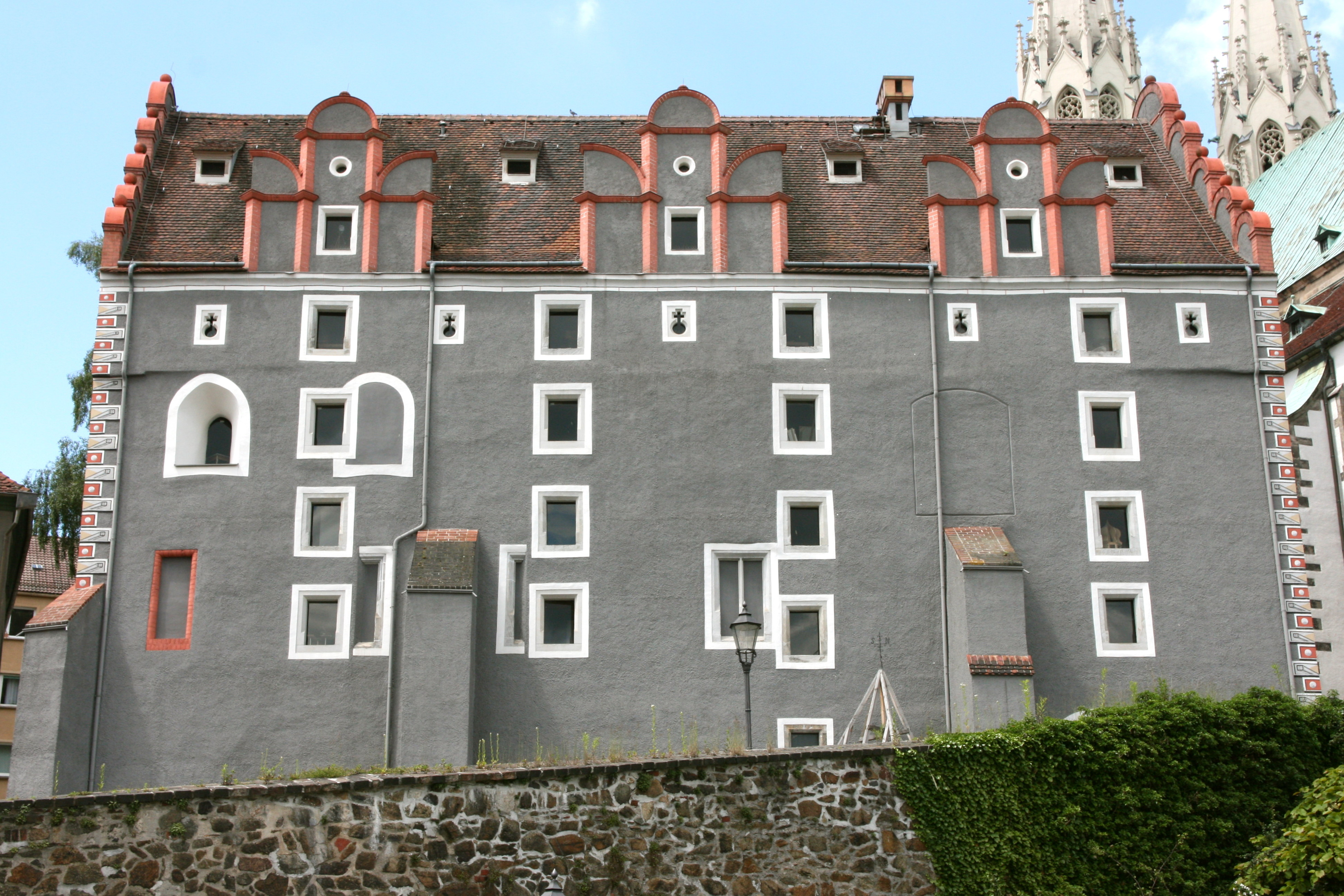 Waidhaus, Blick von der Altstadtbrücke in Görlitz